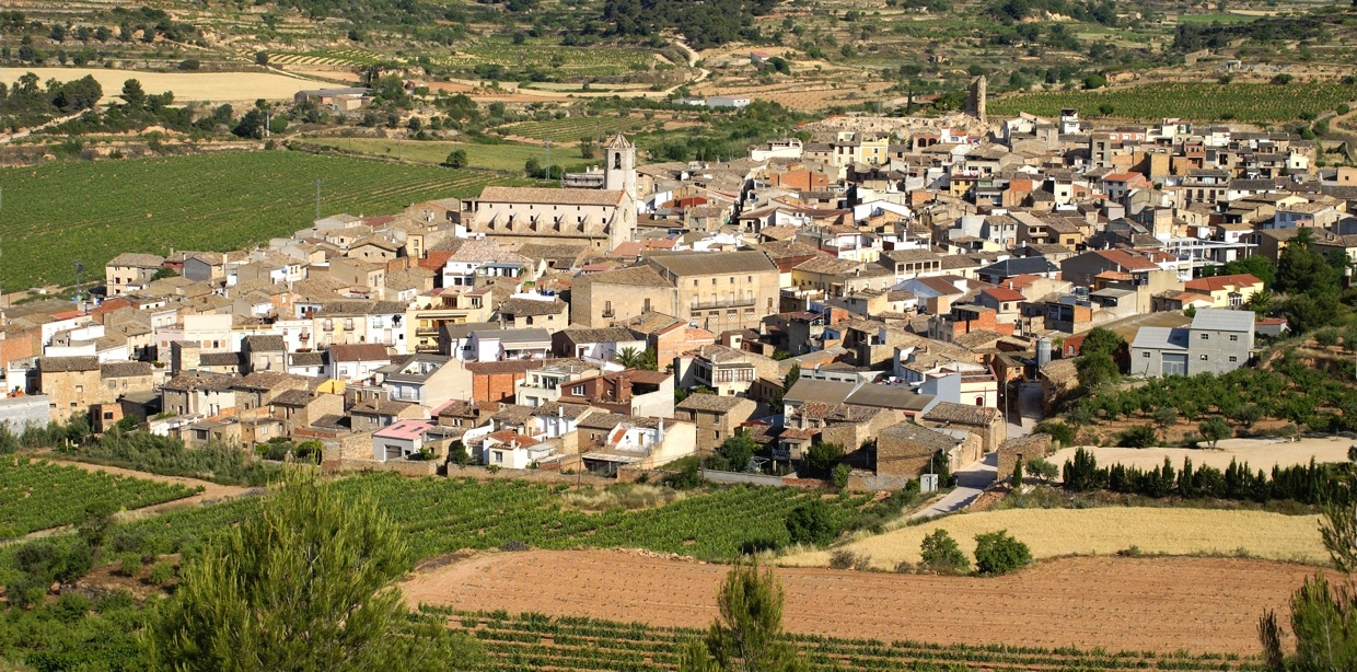 Panorámica de Solivella